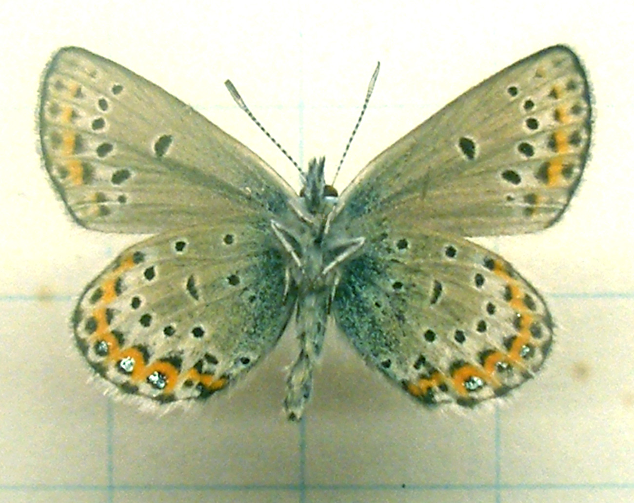 Plebeius idas male underside (Linnaeus, 1761)